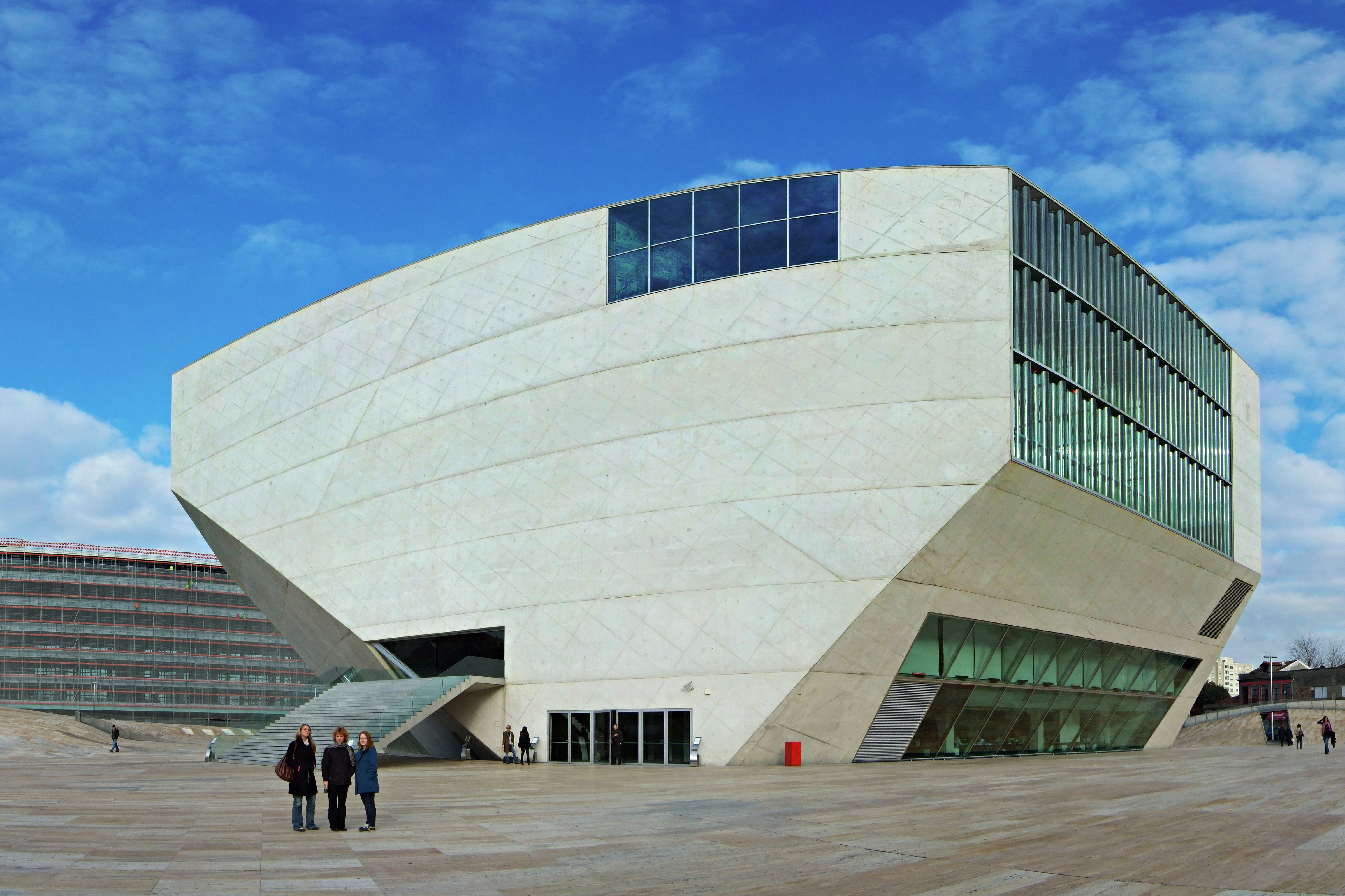 Casa Da Musica